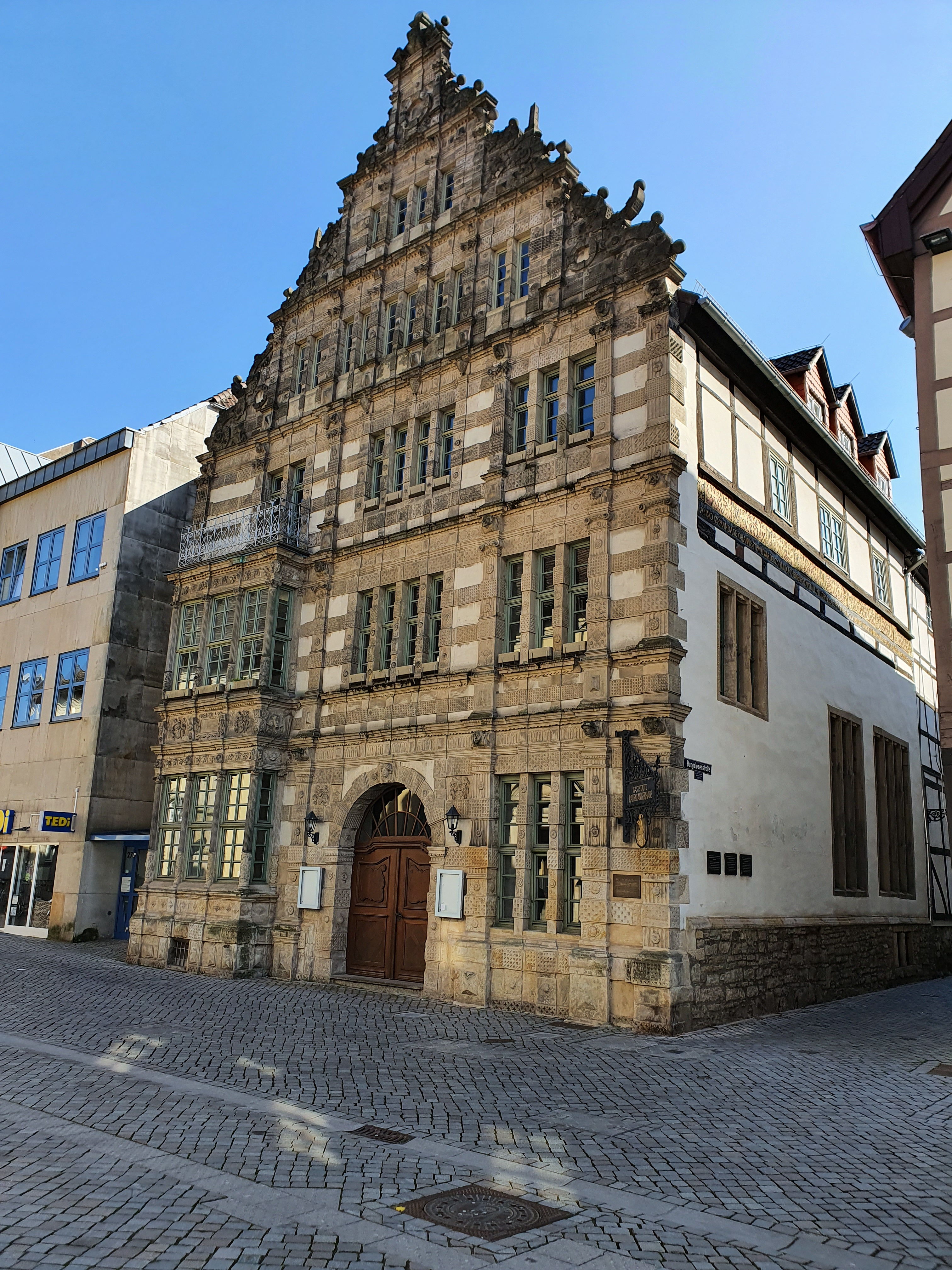 Dom w którym mieszkał Flecista z Hameln w czasie gdy wypędził szczóry z miasta.